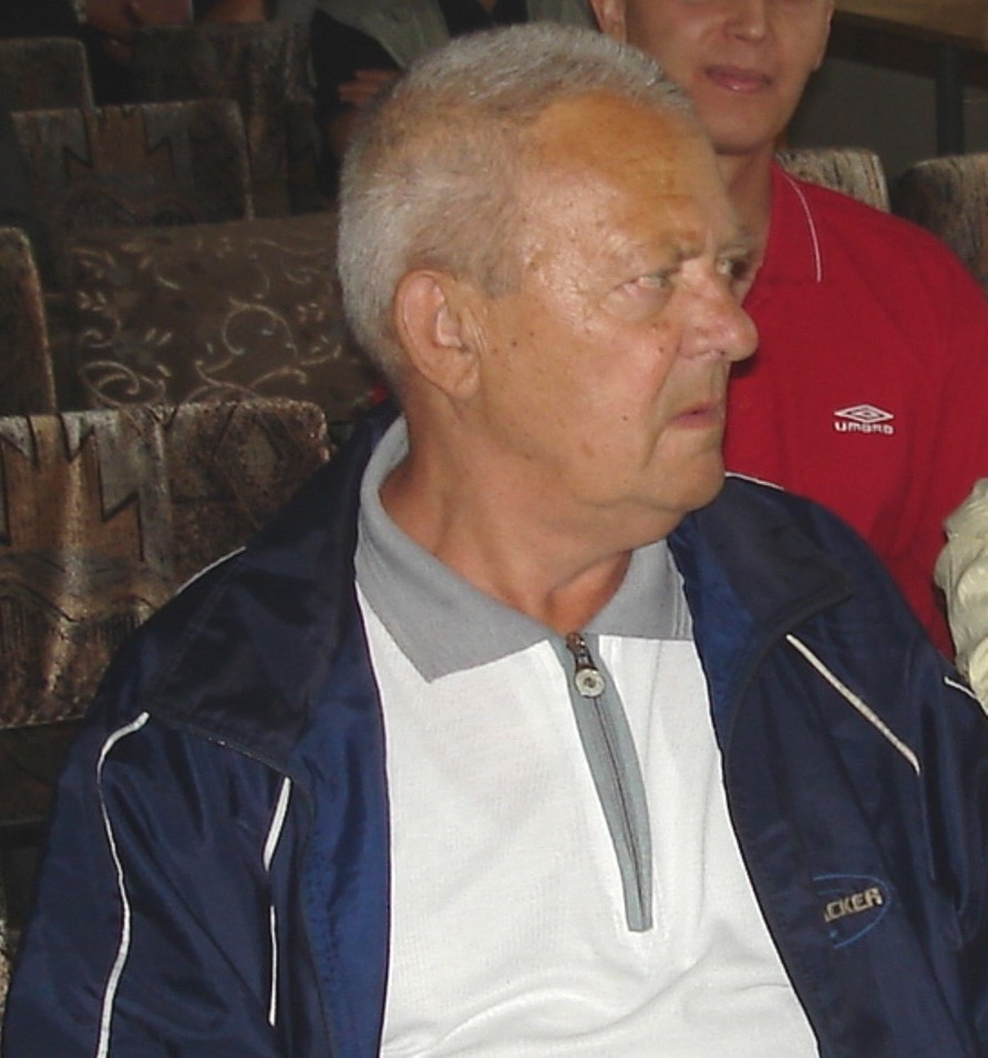 Stargard. Kierownik Klubu Jerzy Żak